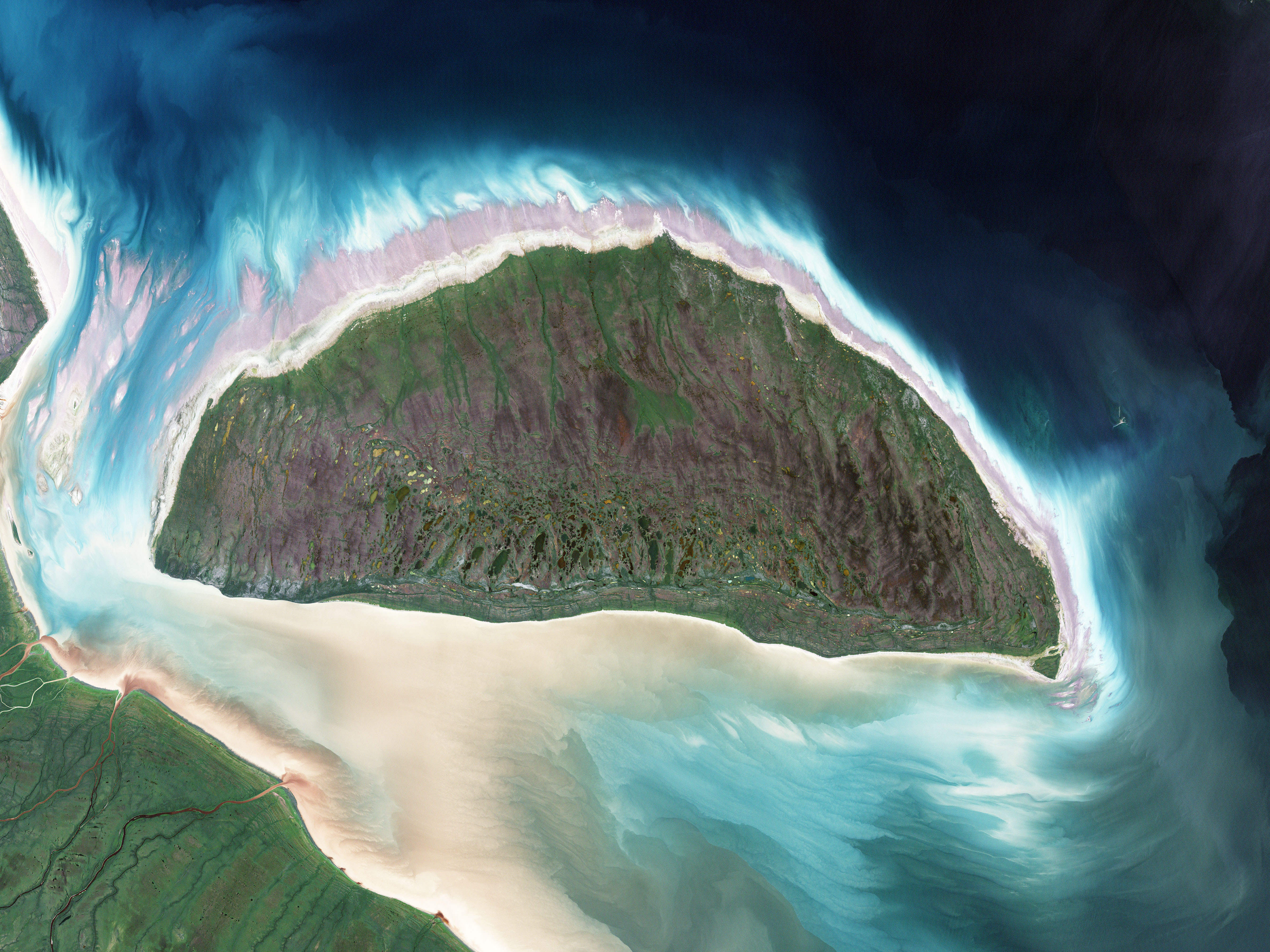 NASA image of Akimiski Island, Nunavut, Canada.